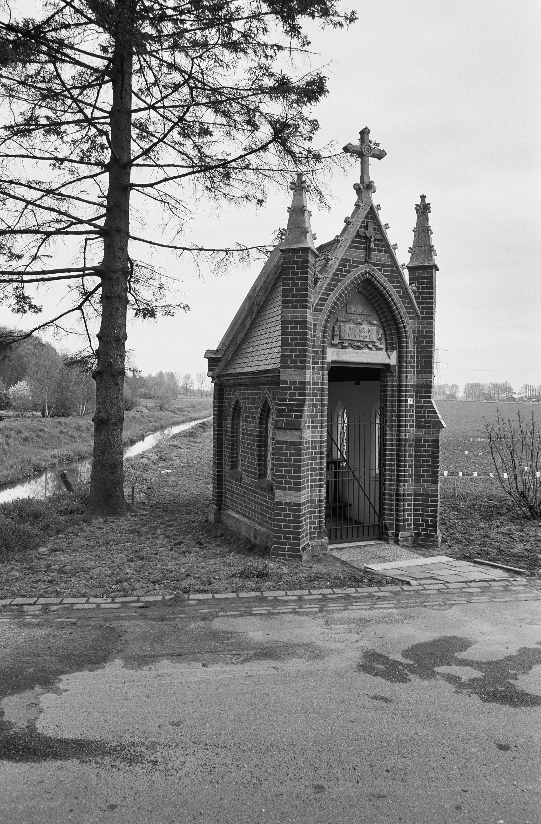 Wegkapel: exterieur - Nunhem, Servaasweg bij 7 - Sint Jobkapel